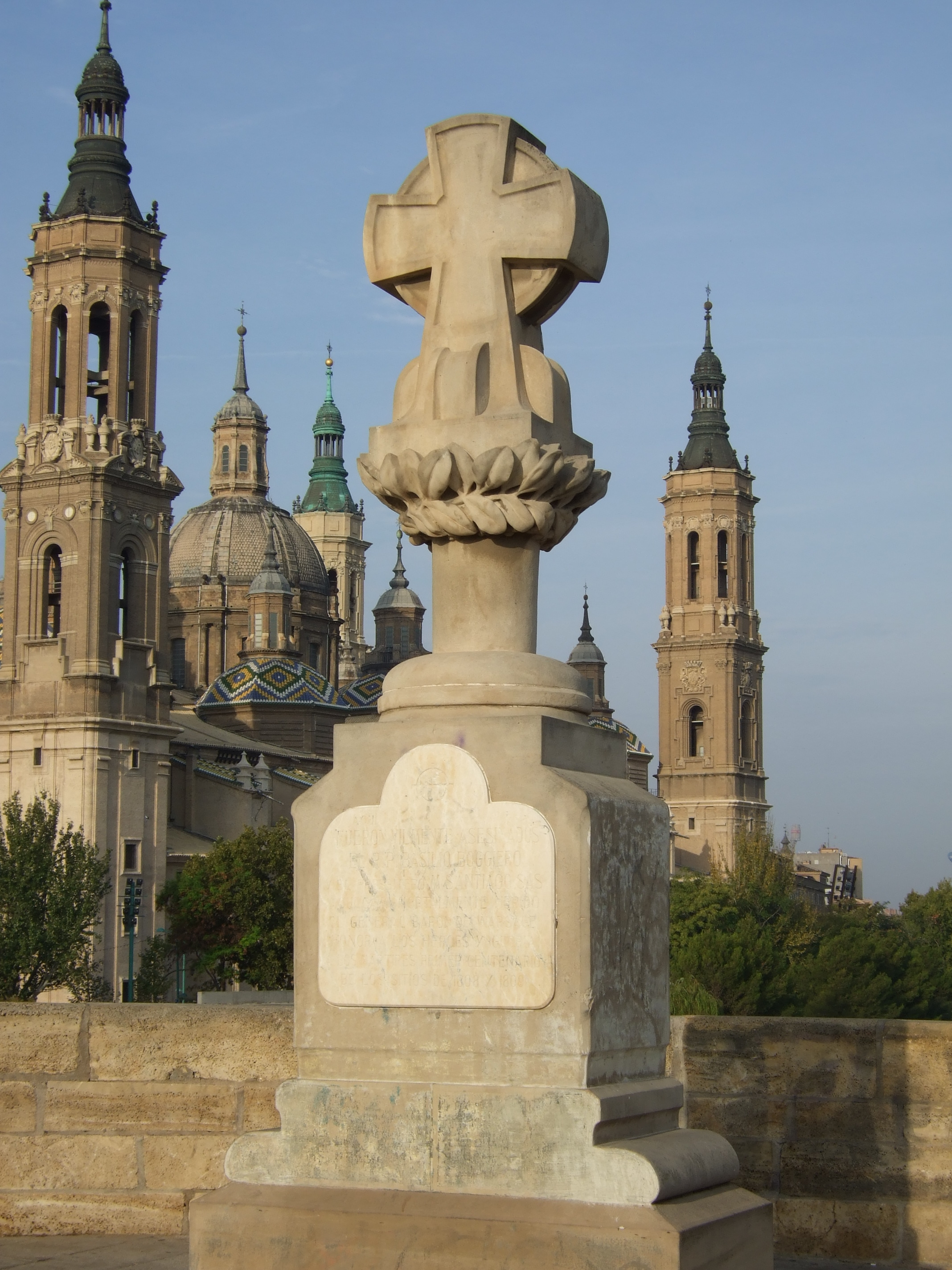 Zaragoza - El Pilar al fondo & Cruz de Basilio - Texto: "Aquí fueron vilmente asesinados el R.P. Basilio Boggiero y el presbítero M. Santiago Sas. Aquí cayó mortalmente herido el Barón de Warsage. Honor a los héroes y gloria a los mártires. Primer Centenario de los Sitios de 1808 y 1809."